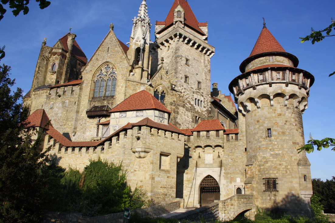 Westansicht der Burg Kreuzenstein in der niederösterreichischen Marktgemeinde Leobendorf. Die ursprüngliche Burg wurde im Zuge des 30-jährigen Krieges zerstört und anschließend als Baumaterial großteils abgetragen. Unter Graf Johann Nepomuk Wilczek erfolgte von 1874 bis 1906 ein Wiederaufbau der Burg als Museum für seine umfangreichen Kunstsammlungen. Die so entstandene Schauburg ist heute, ergänzt durch zahlreiche wiederverwendete mittelalterliche Bauteile und nach teilweiser Beseitigung der Brandschäden von 1915 und der Kriegsschäden von 1945, ein beliebtes Tourismusziel nördlich von Wien.